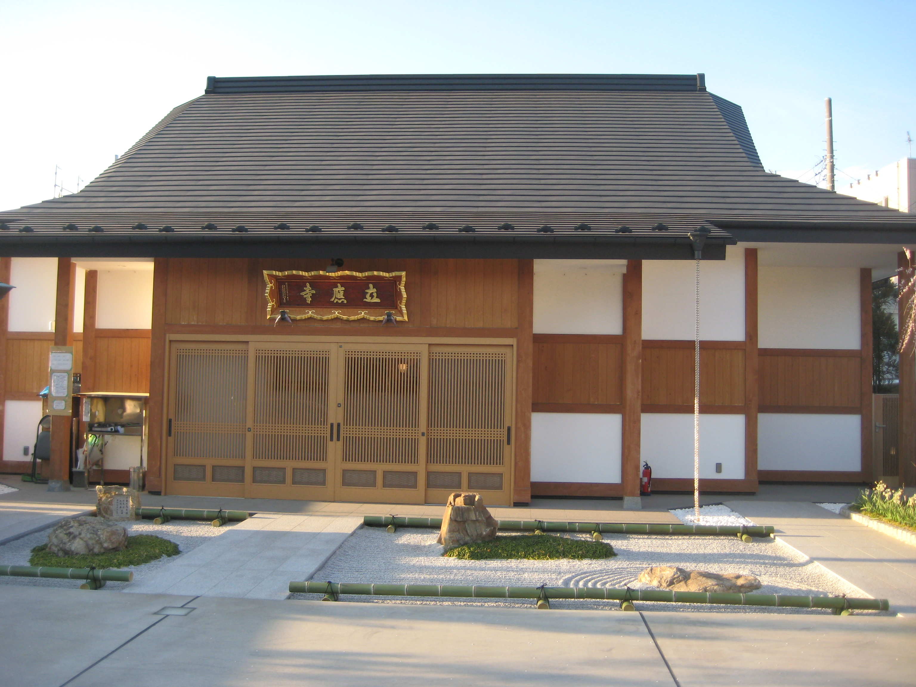 立應寺 りゅうおうじ